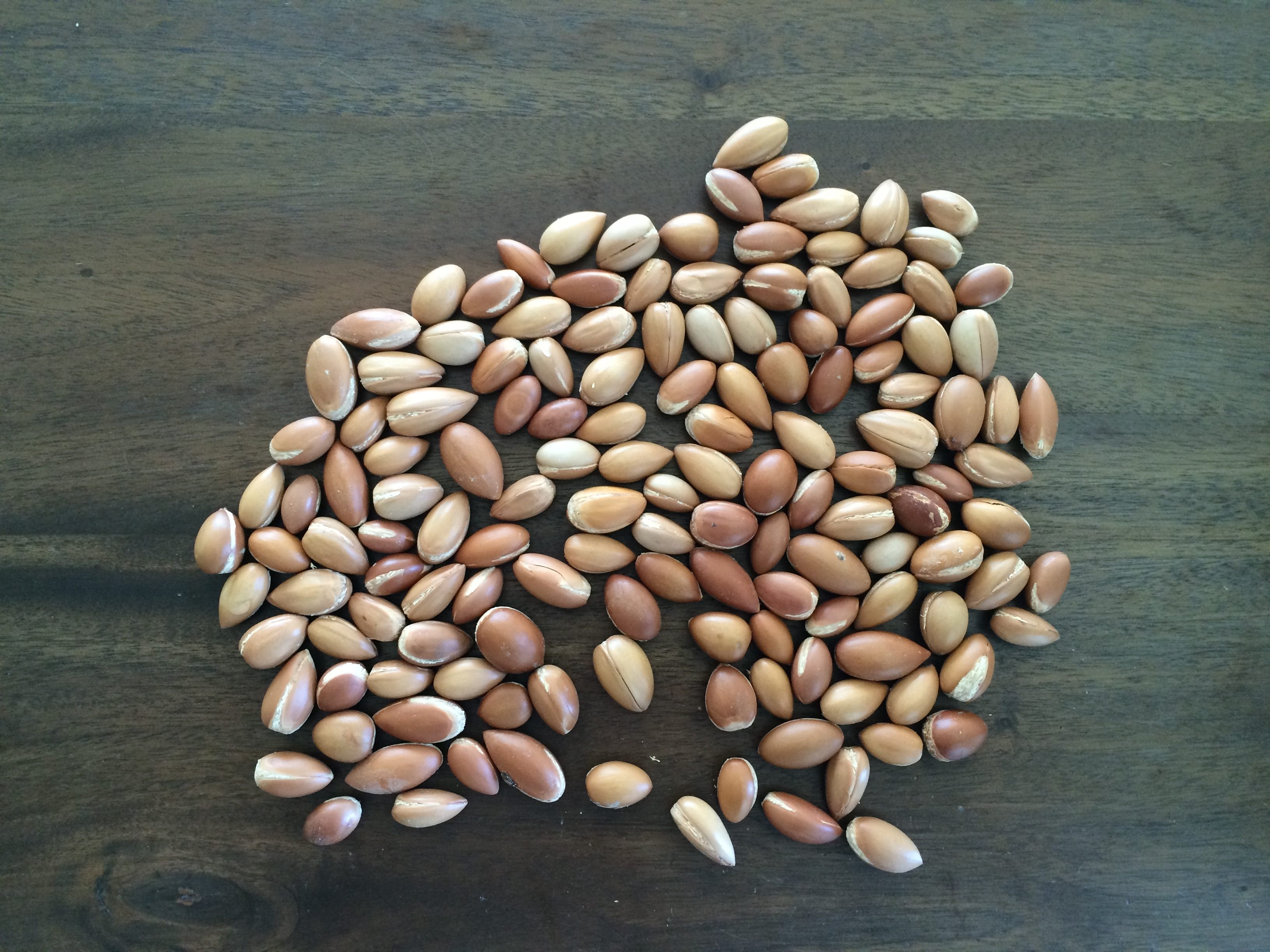 Samen des Arganbaum